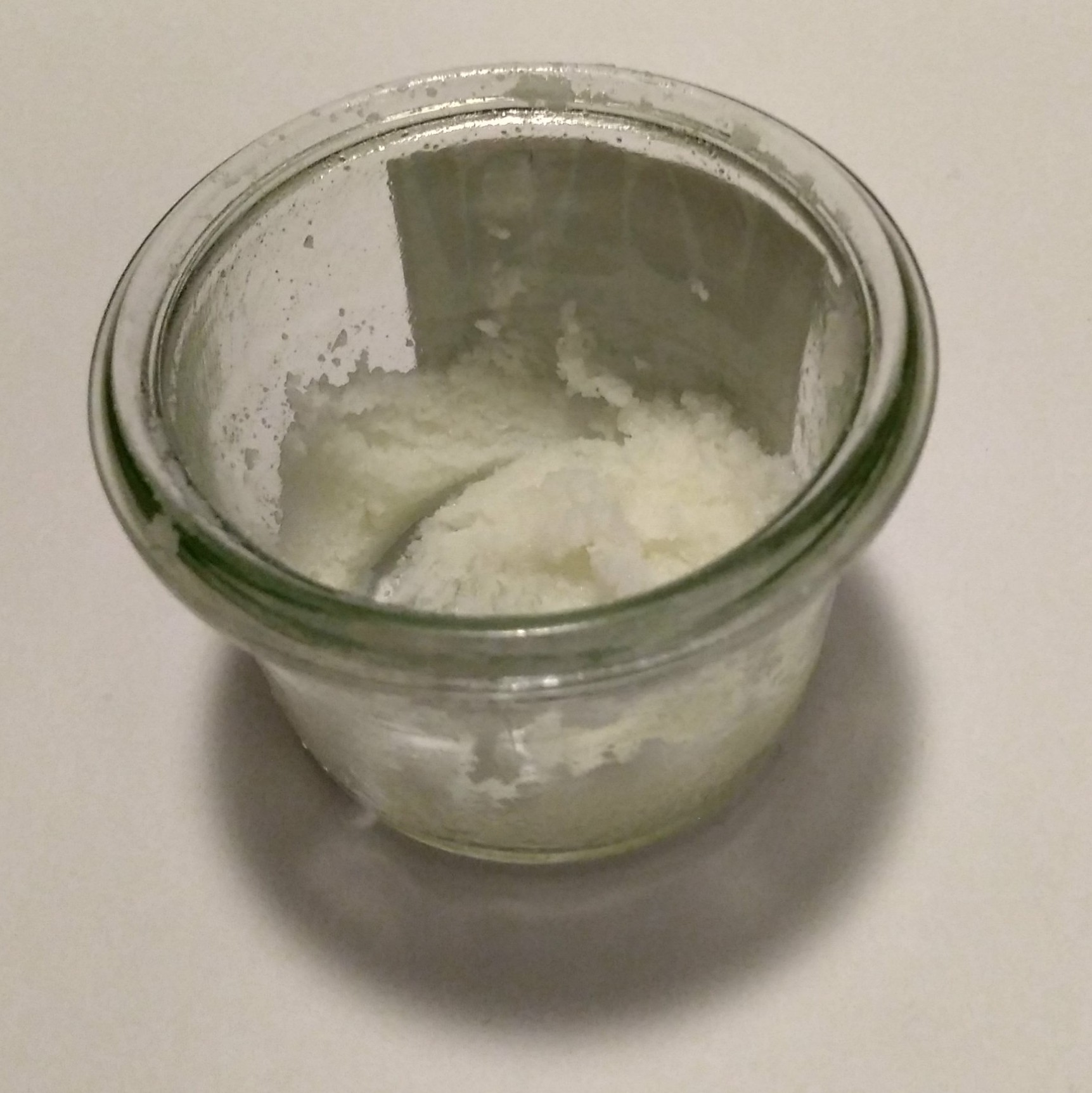 raffinierte Sheabutter in einem Gefäß mit dem Durchmesser 5,5cm; gekauft im Loseladen Hannover